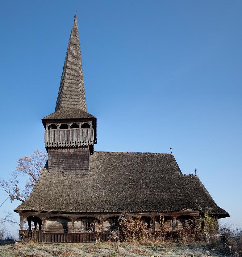 Biserica de lemn din Sânmihaiu Almaşului, judeţul Sălaj